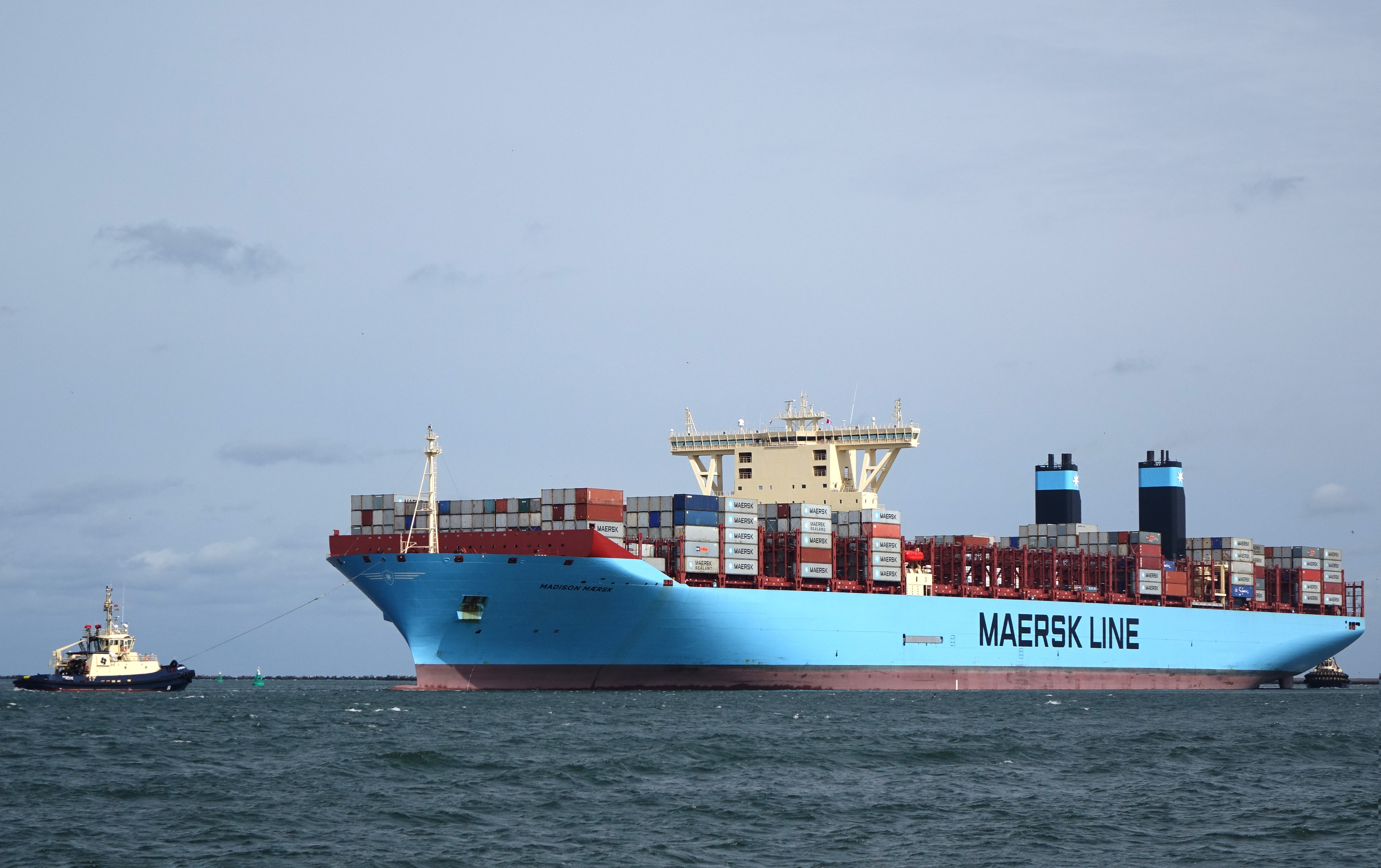 Madison Maersk, Beerkanaal Europoort 16-8-2014